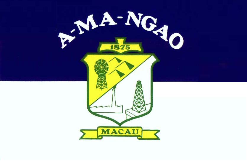 Bandeira do município de Macau, Rio Grande do Norte, Brasil.